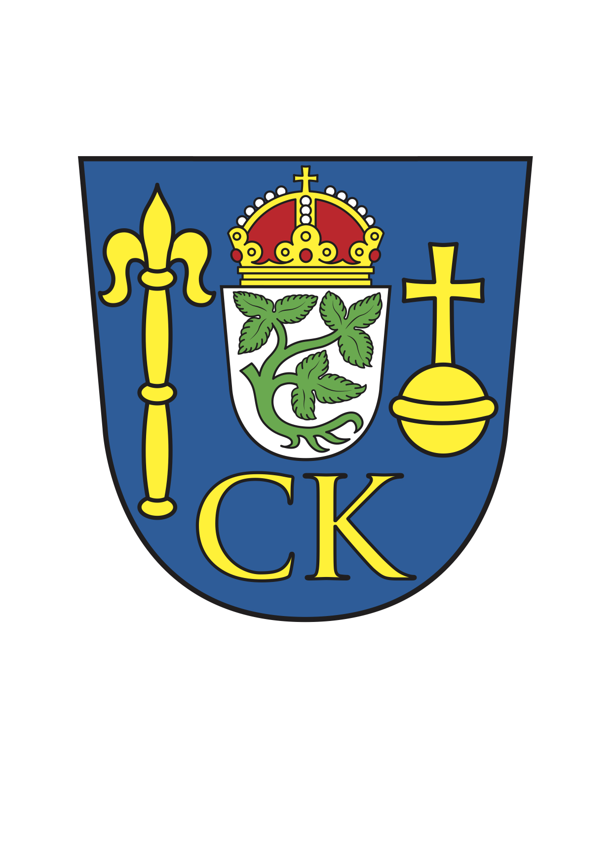 Znak (erb) Kolegiátní kapituly Nanebevzetí Panny Marie na hradě Karlštejně